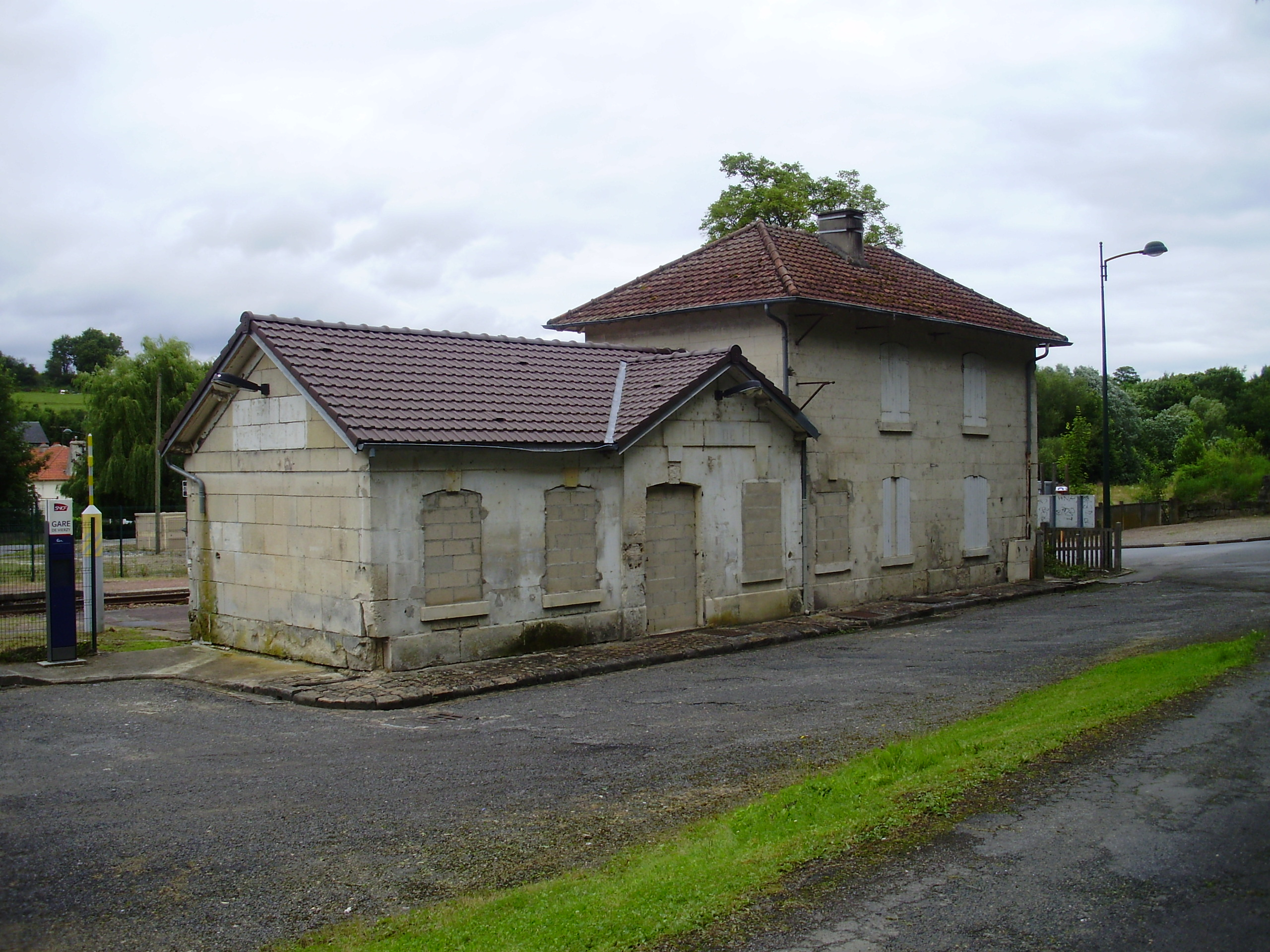 Gare de Vierzy, Aisne, France : ex-bâtiment voyageurs, fermé, vu depuis un chemin rural au sud de la gare.